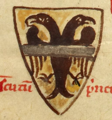 Arms of Manfred, son of Frederick II